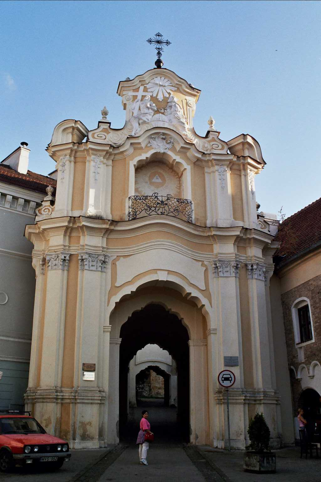 Fare de Vikipediisto:Kani - Mi faris tiun foton kaj permesas ties uzadon.